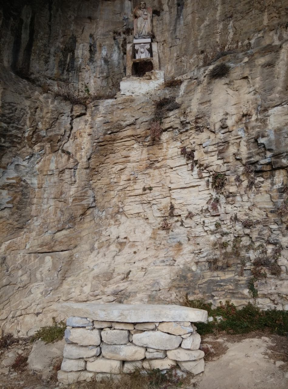 Lettomanoppello: Eremo di Sant'Angelo